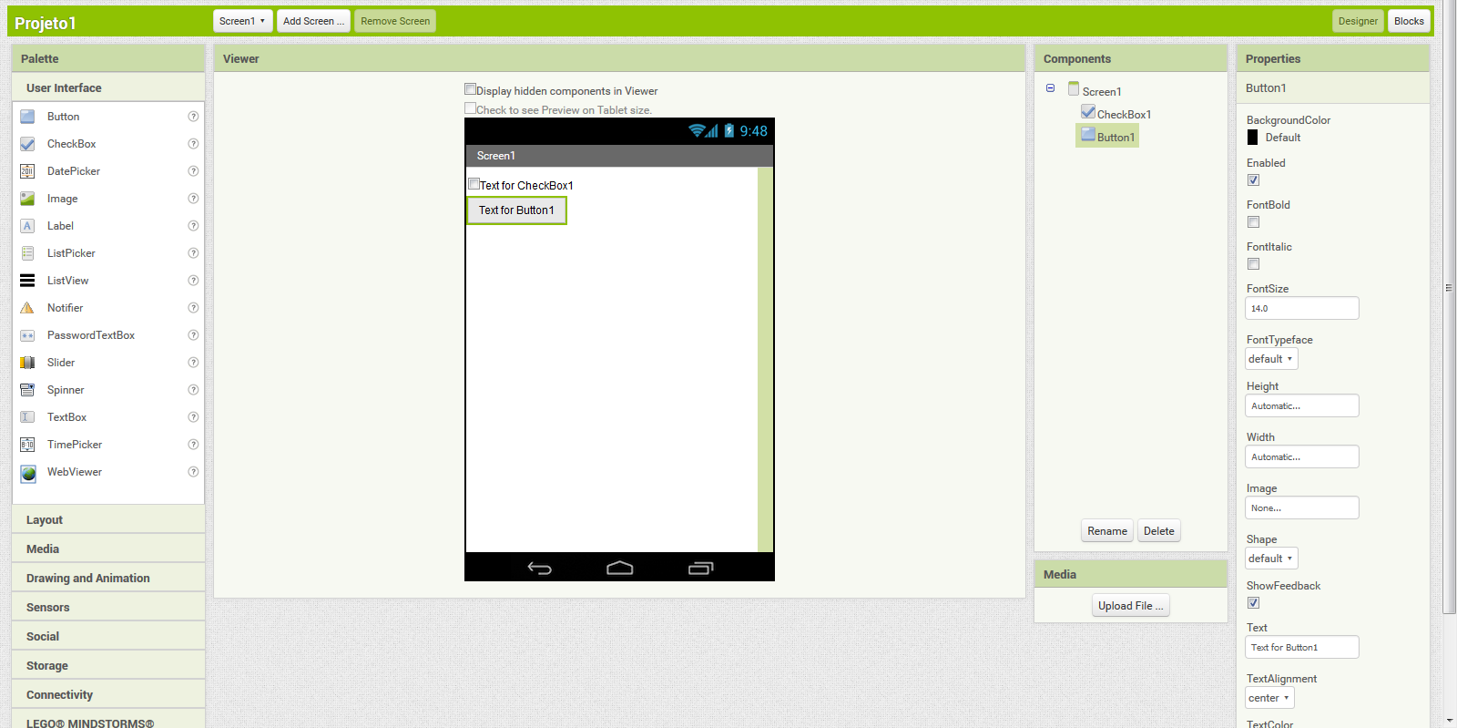 Um print da tela Web-Based Software APP Inventor